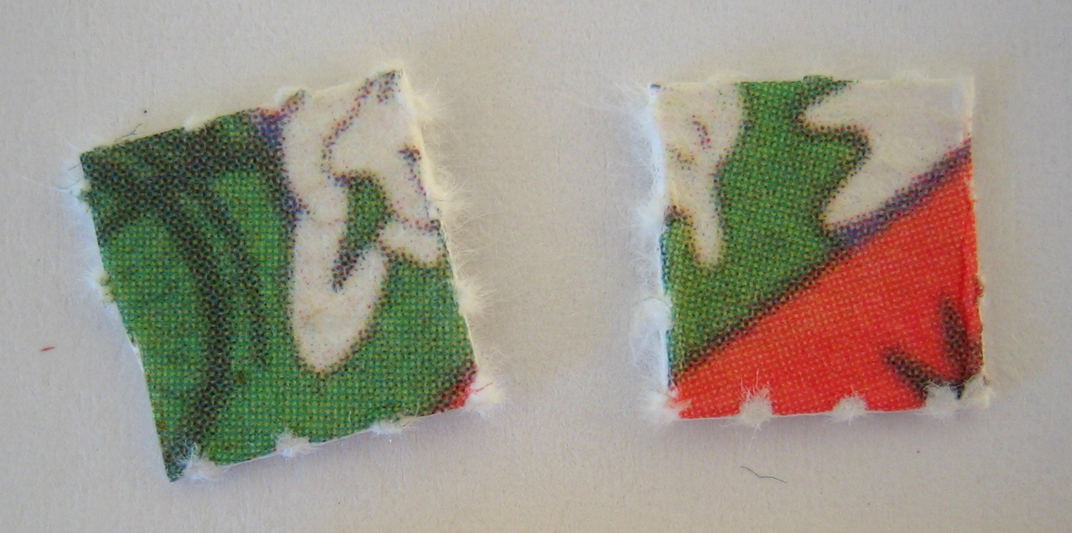 LSD blotter.